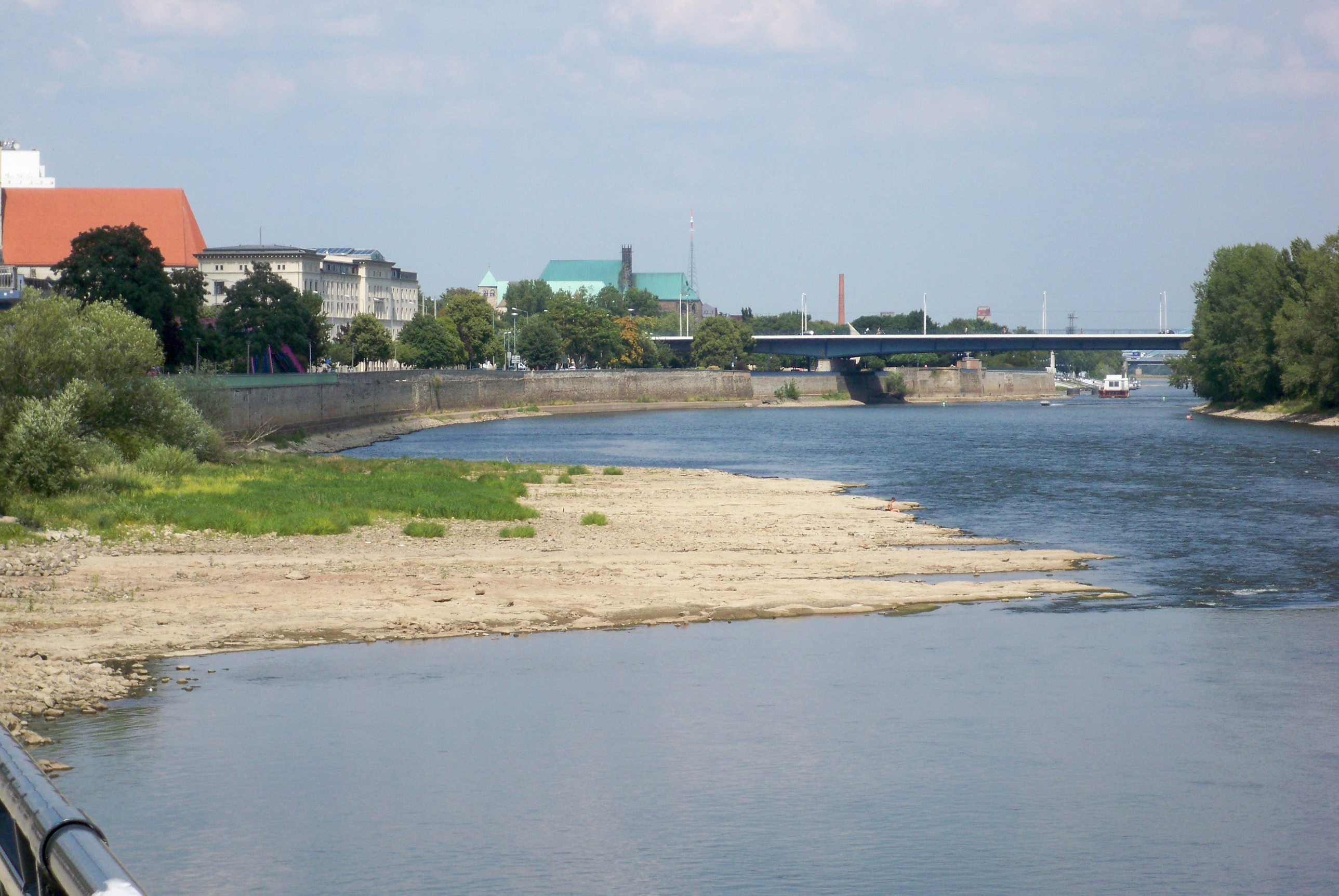 Magdeburger Domfelsen bei niedrigem Elbpegel (63 cm MD-Strombrücke)